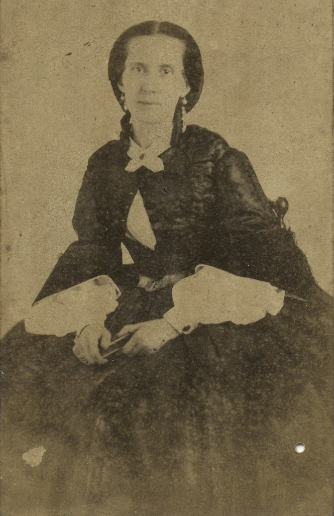 Mercedes Jijón de Vivanco y Chiriboga, esposa del presidente ecuatoriano Juan José Flores, y por tanto la primerísima Primera Dama de ese país. Imagen captada en Quito alrededor del año 1855. Fondo Archivo Municipal de Guayaquil del Archivo Nacional de Fotografís de Ecuador.